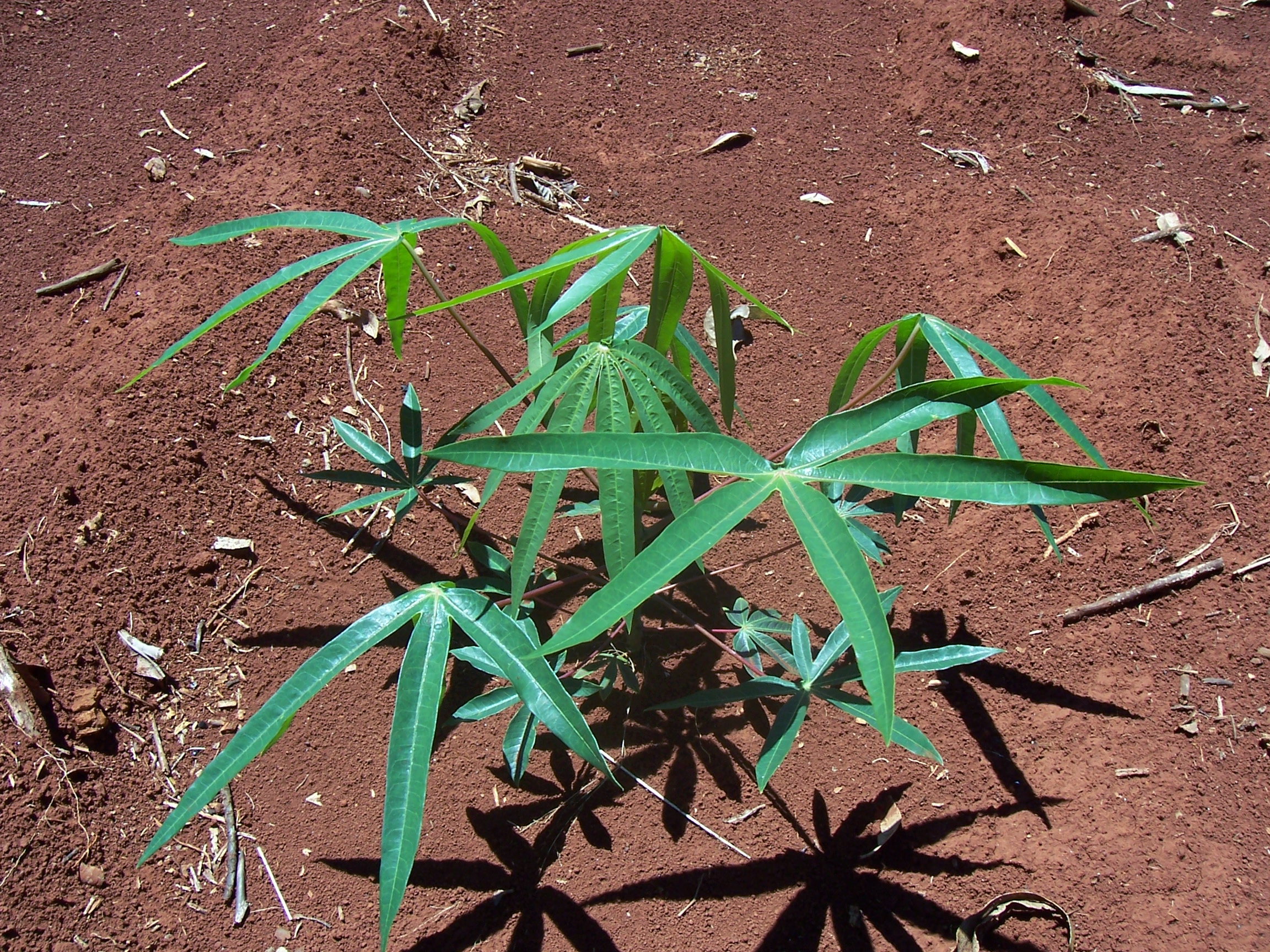 Planta de Mandioca (Manihot esculenta) en la provincia de Misiones (Argentina).